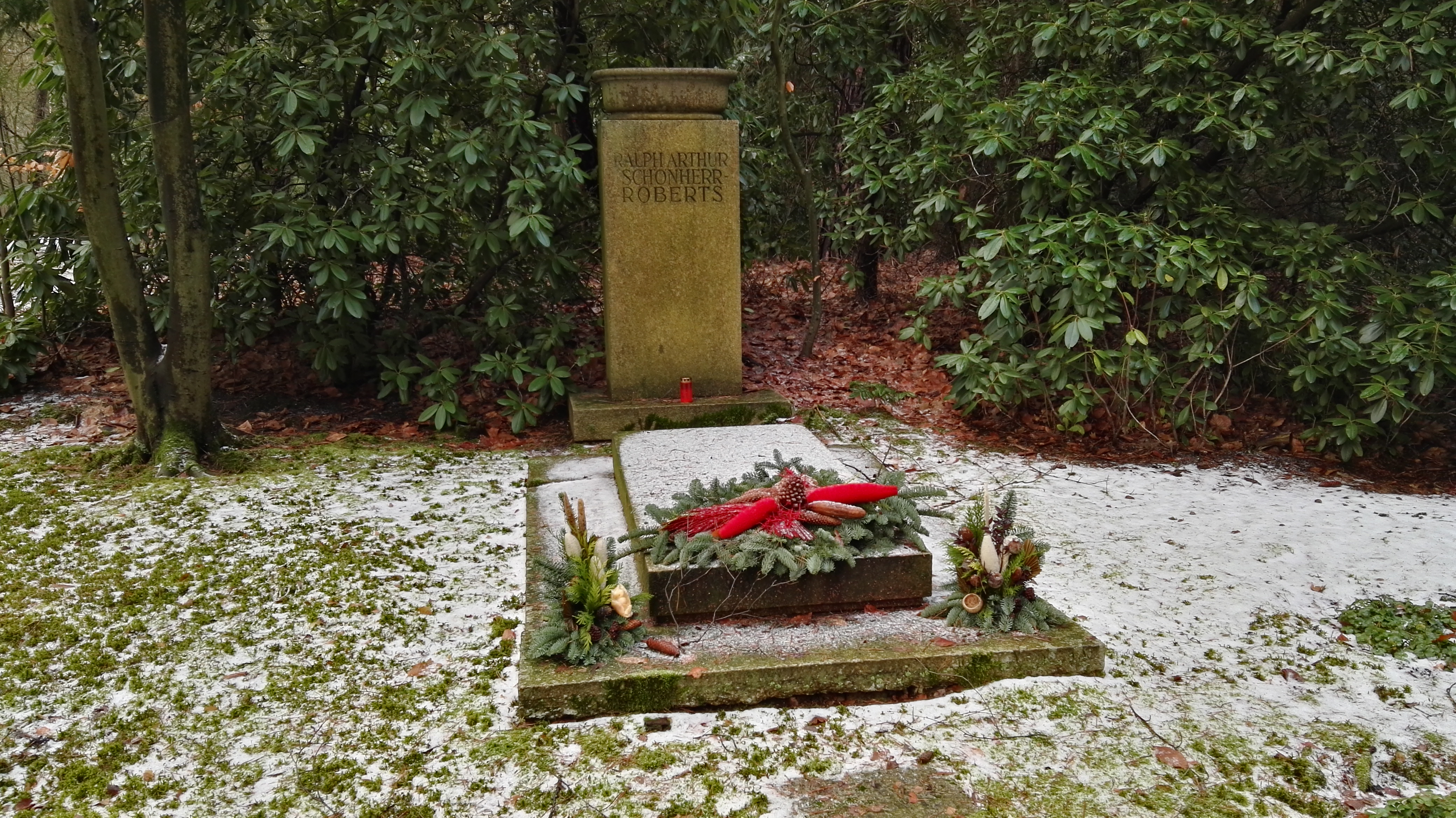 Grab von Ralph Arthur Roberts auf dem Südwestkirchhof Stahnsdorf